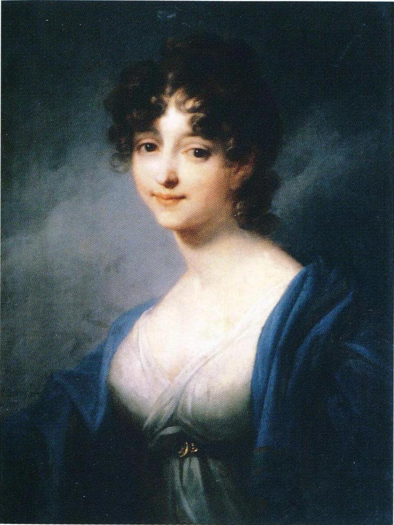 Cathèrine Fredrique Wilhelmine Beningna, Saganin herttuatar.